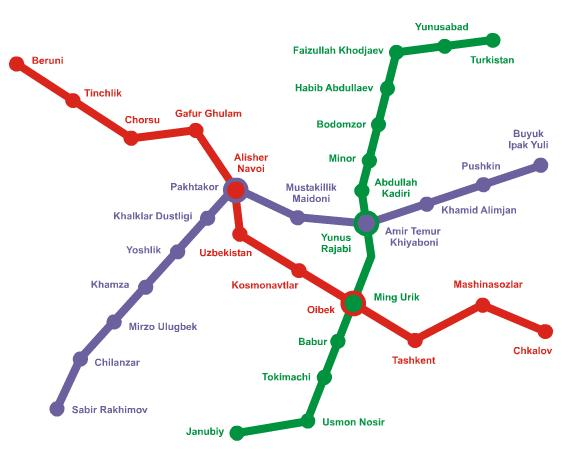 Plan du métro de Tachkent